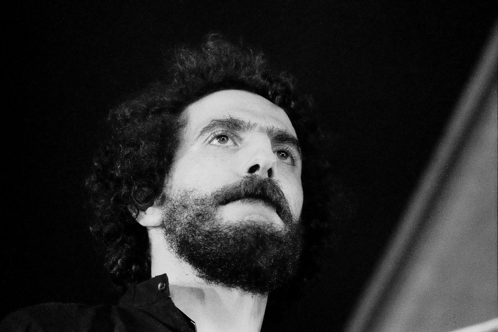 Areski, Fête du PSU, Colombes, 1973